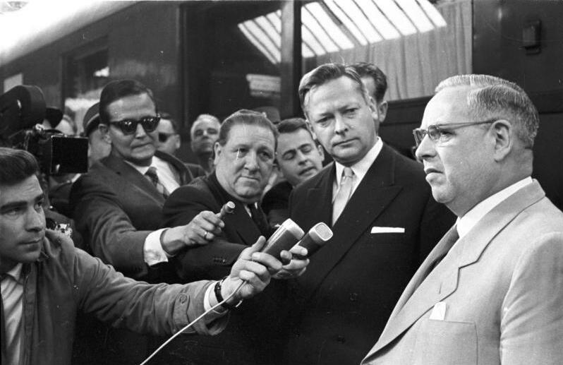 Genf, Aussenministerkonferenz, Ankunf Dr. Bolz Zentralbild-Sturm,11.5.1959, Delegation der DDR zur Aussenministerkonferenz in Genf eingetroffen Die Delegation der DDR zur Genfer Aussenministerkonferenz ist am 9.5.1959 auf dem Genfer Hauptbahnhof eingetroffen. Zum Empfang hatten sich die Vertreter der Sowjetunion und anderer befreundeter Länder sowie Vertreter schweizerischer Behörden eingefunden. Bereits eine halbe Stunde vor Ankunft wartete eine große Gruppe von Zeitungs- und Fotokorrespondenten aus aller Welt gespannt auf die Ankunft des Sonderzuges der DDR. U.B.z.: Journalisten aus aller Welt bestürmen Aussenminister Dr. Lothar Bolz nach dessen Ankunft auf dem Genfer Hauptbahnhof. 2-teil. Panorama Abgebildete Personen: Bolz, Lothar Dr. jur.: Stellvertretender Ministerratsvorsitzender, Außenminister, DDR (GND 124381197)